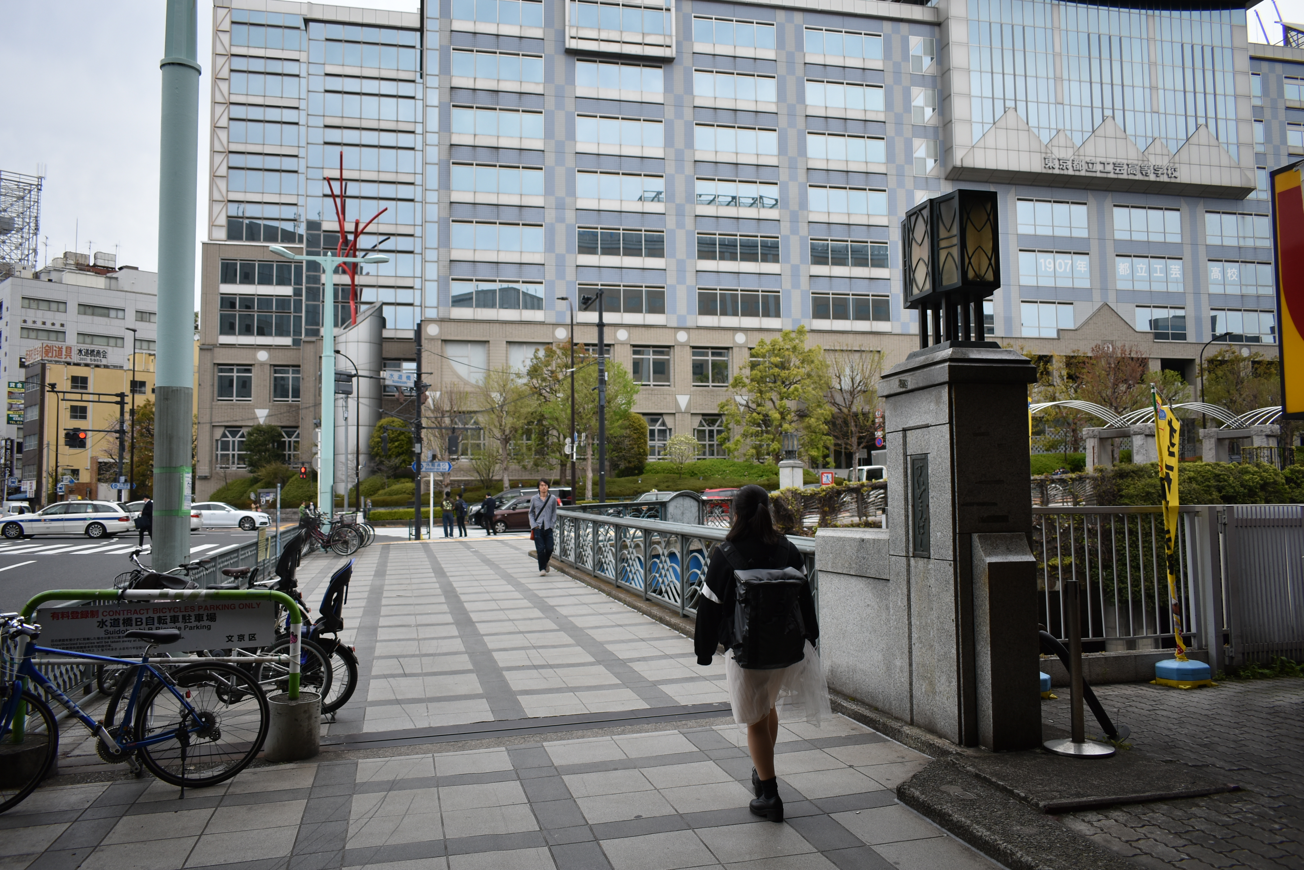 文京区 水道橋 Nikon D3400